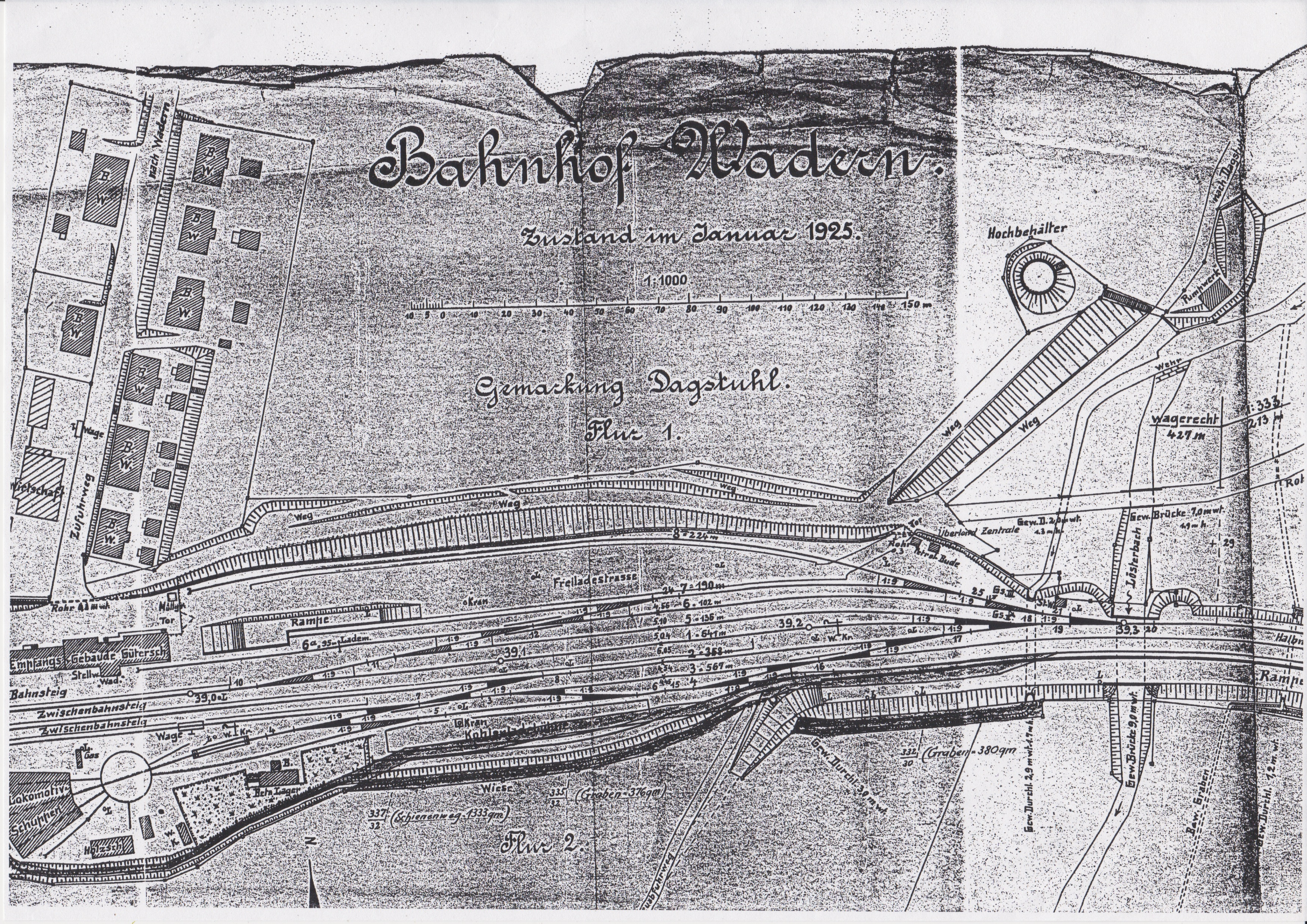 Gleisplan des Waderner Bahnhofs 1925